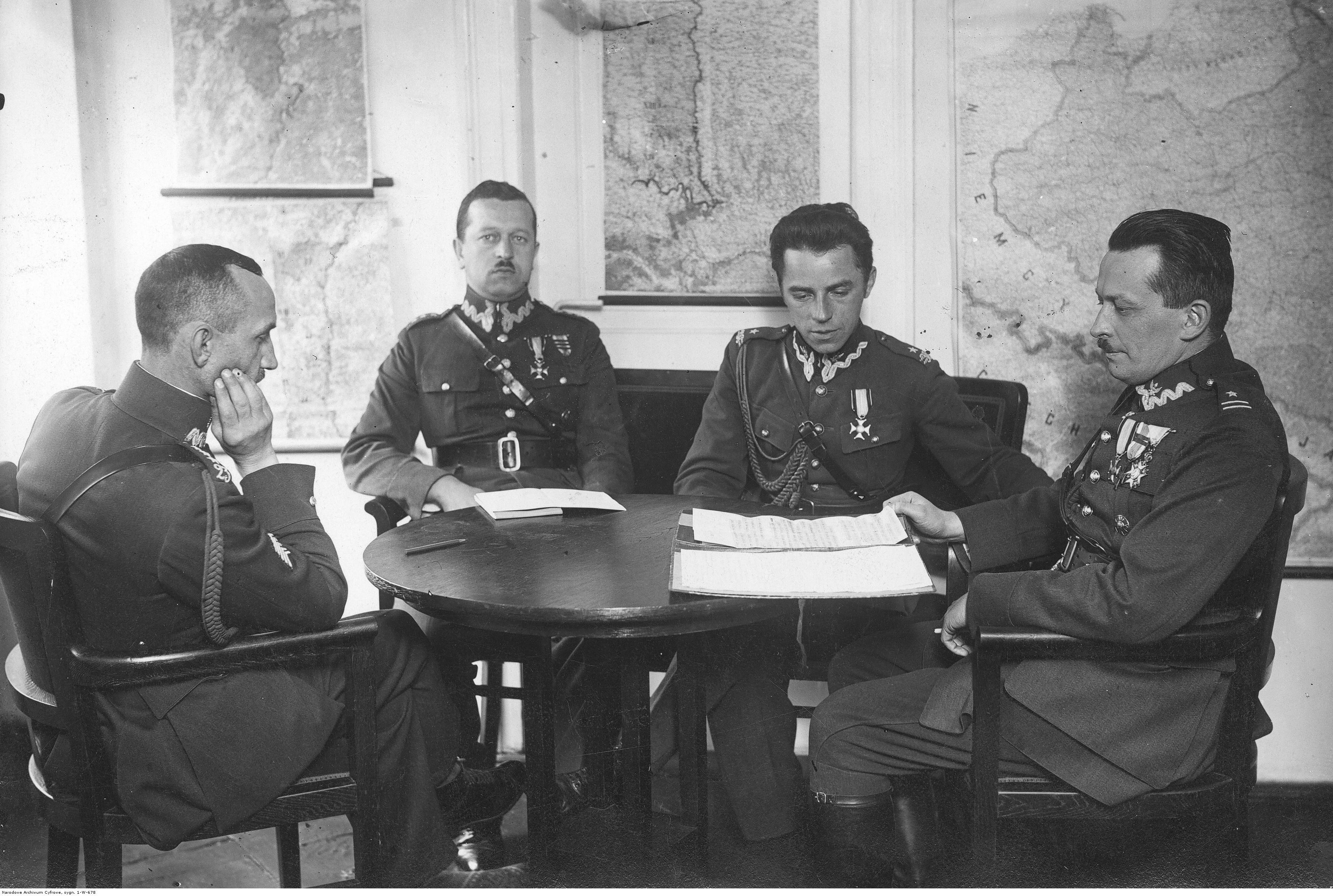 Major Artur Maruszewski (pierwszy z prawej) i Tadeusz Münnich (drugi z prawej) oraz inni w czasie pracy w sztabie KOP-u. Koncern Ilustrowany Kurier Codzienny - Archiwum Ilustracji. Sygnatura: 1-W-678